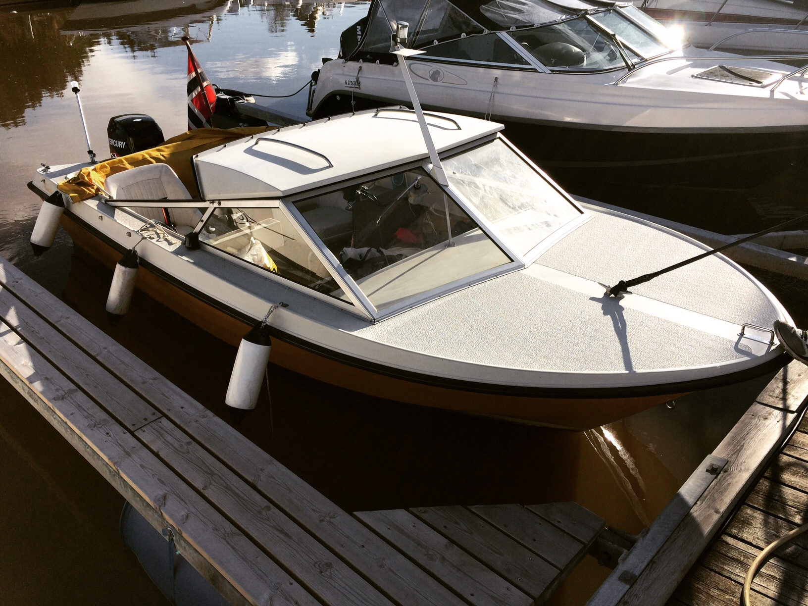 1975 Wesling